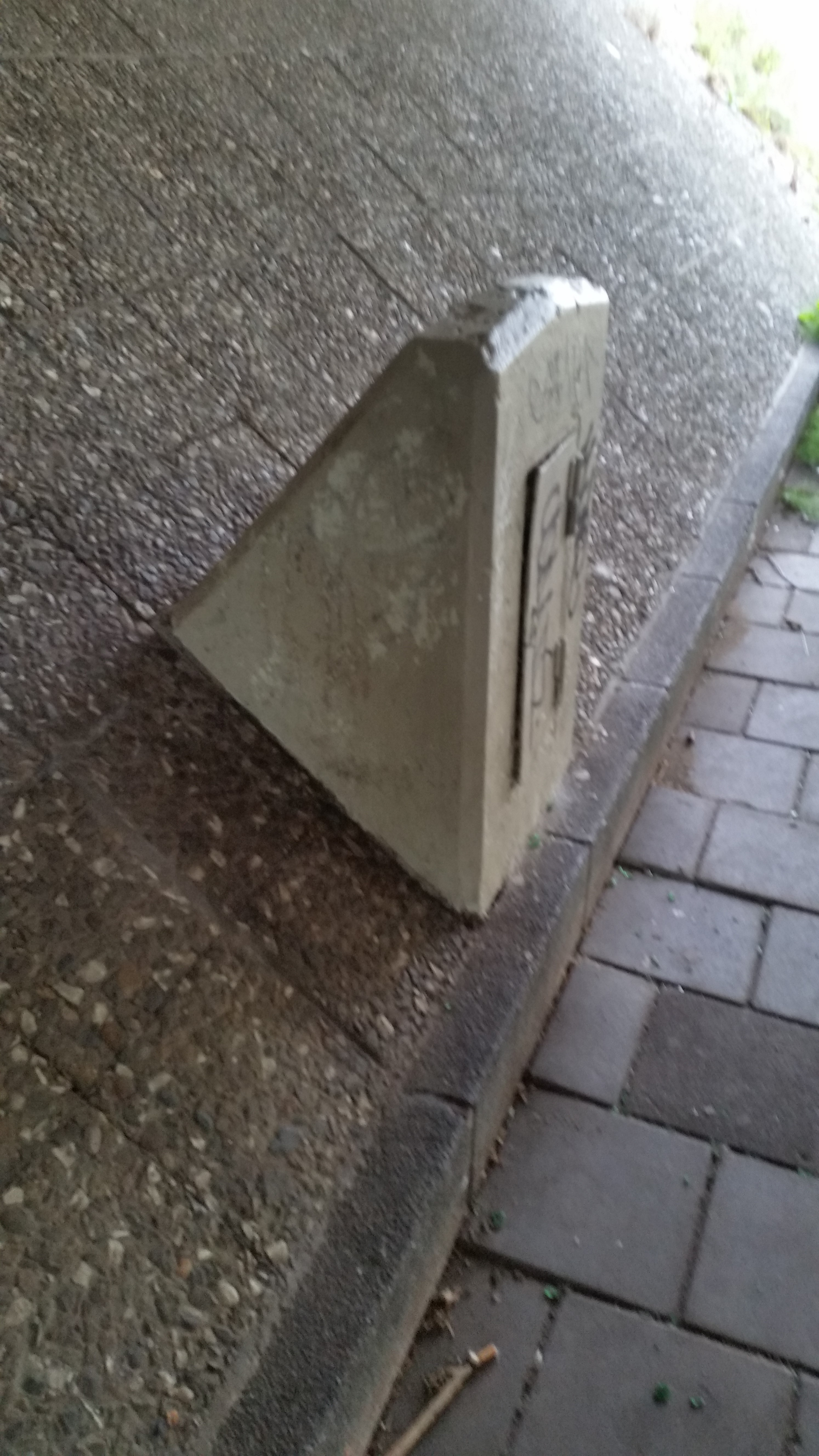 Impressie van de Dolingadreefbrug (brug 1012) in juli 2012